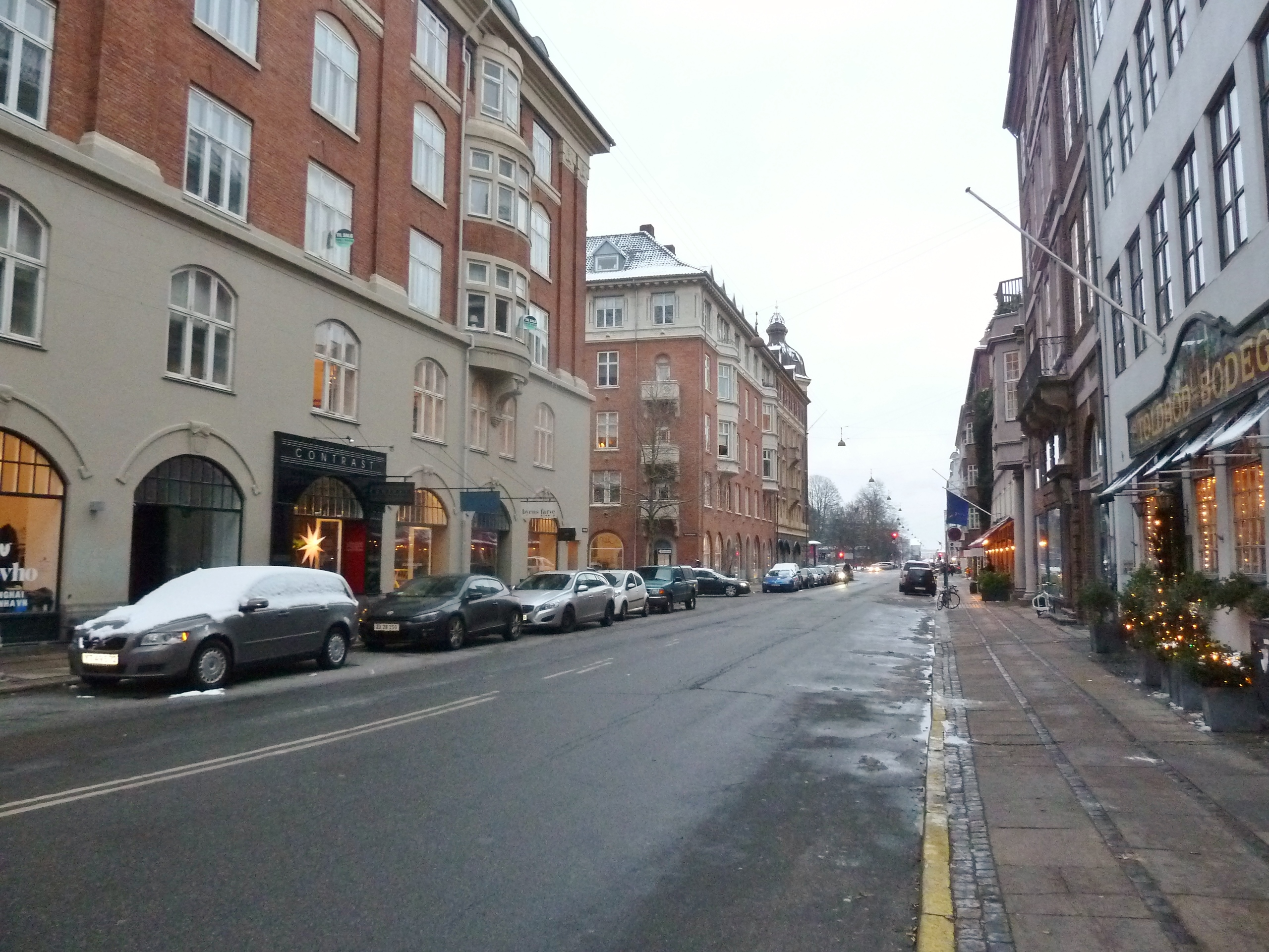 The street Esplanaden in Indre By, Copenhagen.